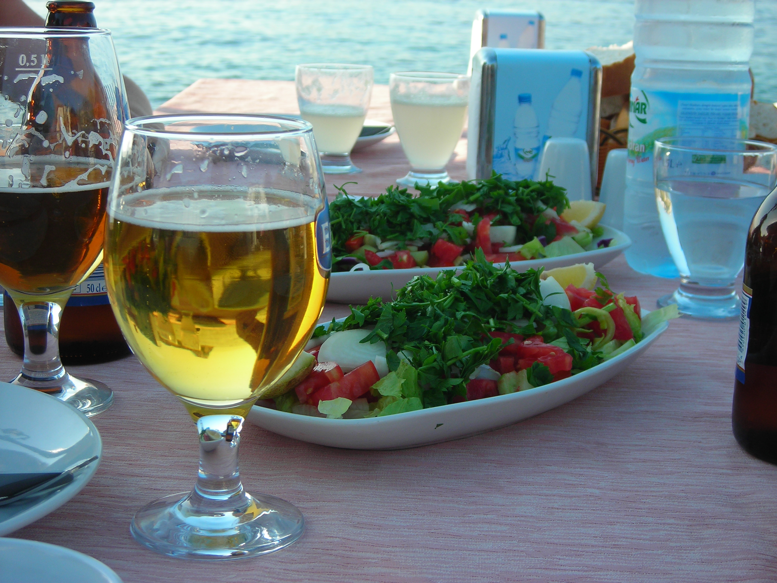 Çoban salata yanında bira